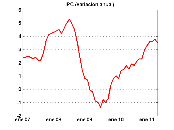 Variación anual del IPC entre 2007 y principios de 2011. Datos extraídos de la página del INE.